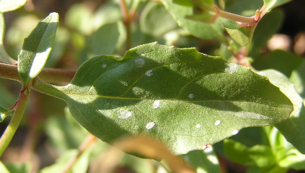 Beschreibung: Blatt eines Lanzett-Weidenröschens. Aufgenommen im Juli 2005 in den Weinbergen bei Mayschoß im Ahrtal.